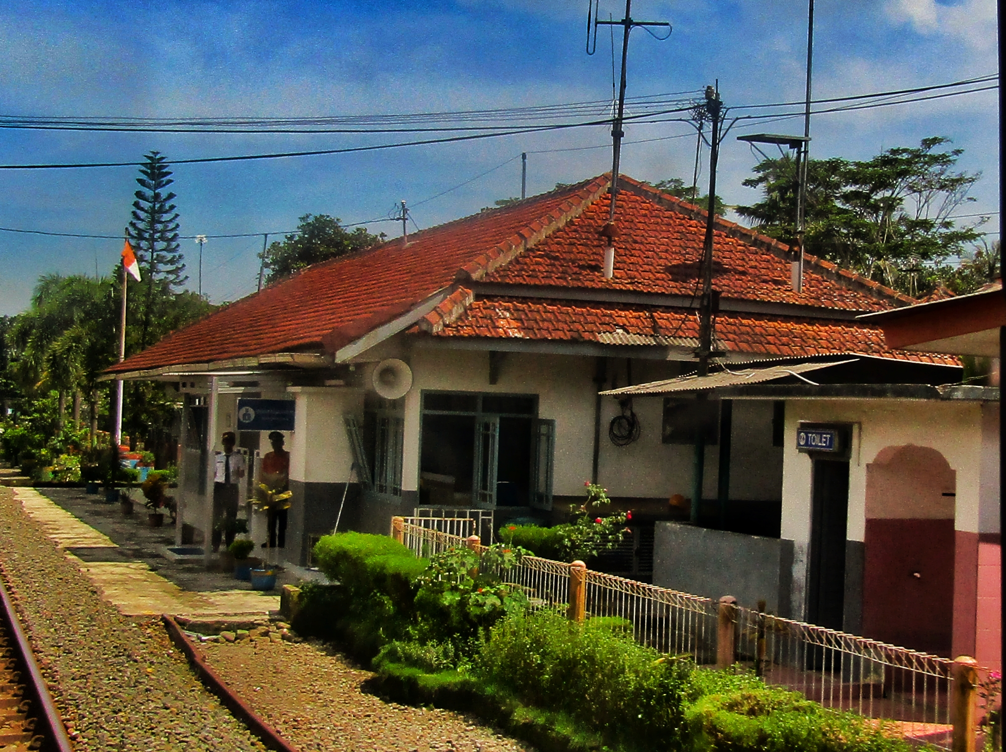 Bangunan utama Stasiun Jeruklegi, 2020